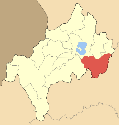 Дем Йон Драгумис на картата на Ном Костур, Гърция Locator map of Ionos Dragoumi municipality (Δήμος Ίωνος Δραγούμη) at Kastoria perfecture, Greece).